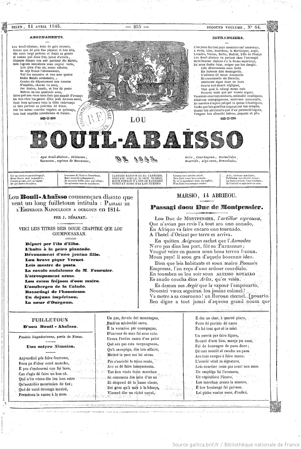 Edicion del periodico provenzal Lou Bouilh-abaisso de 1845